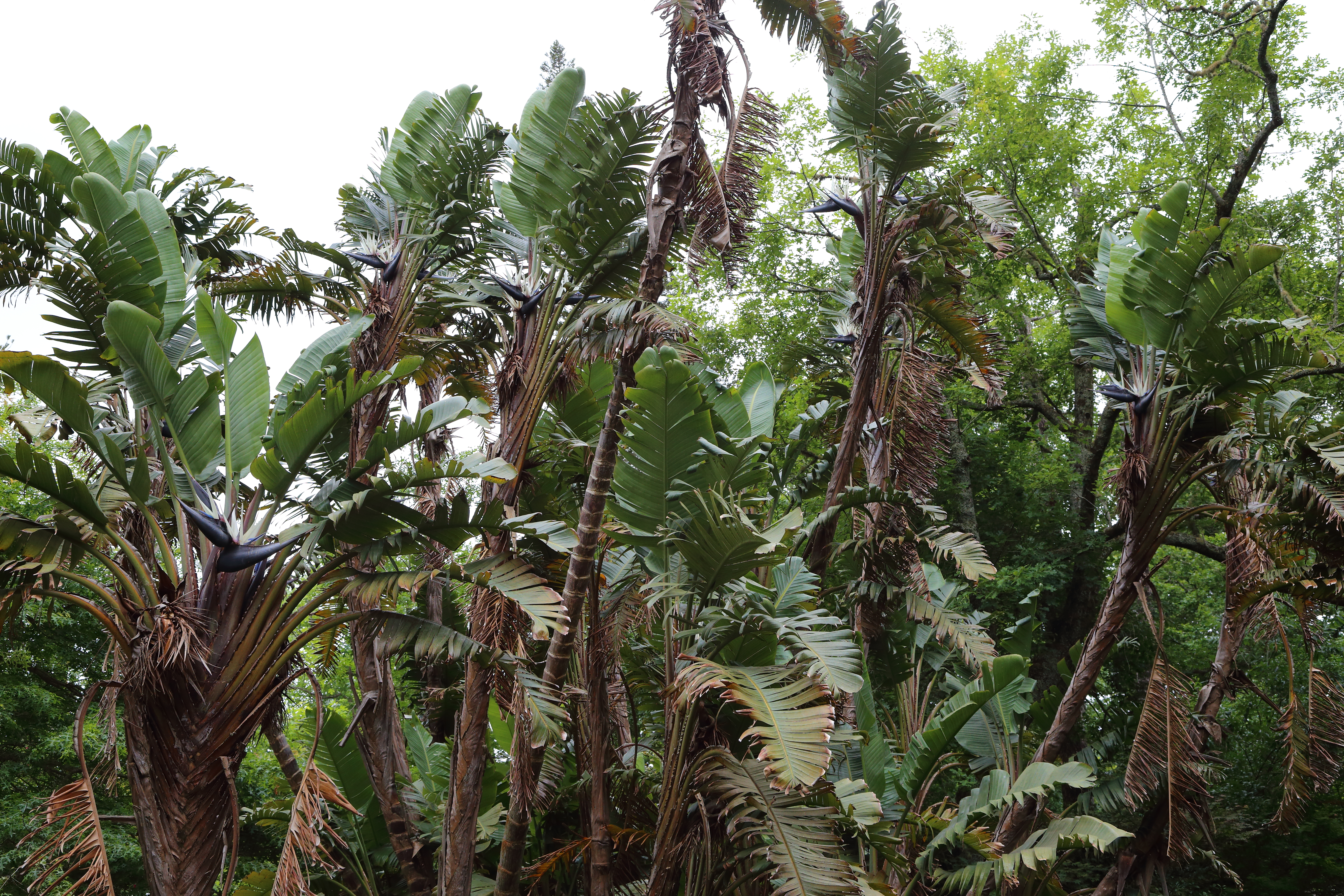 Strelitzia nicolai i parken Terra Nostra, Furnas, Azorerna.